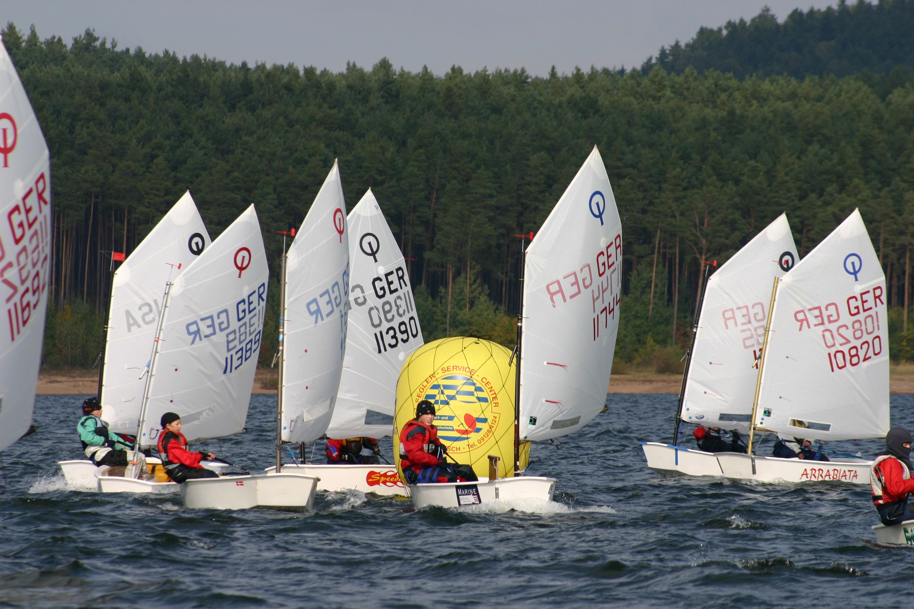 Optiregatta auf dem Großen Brombachsee